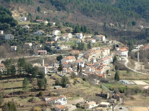 Vue d'ensemble du collet de deze